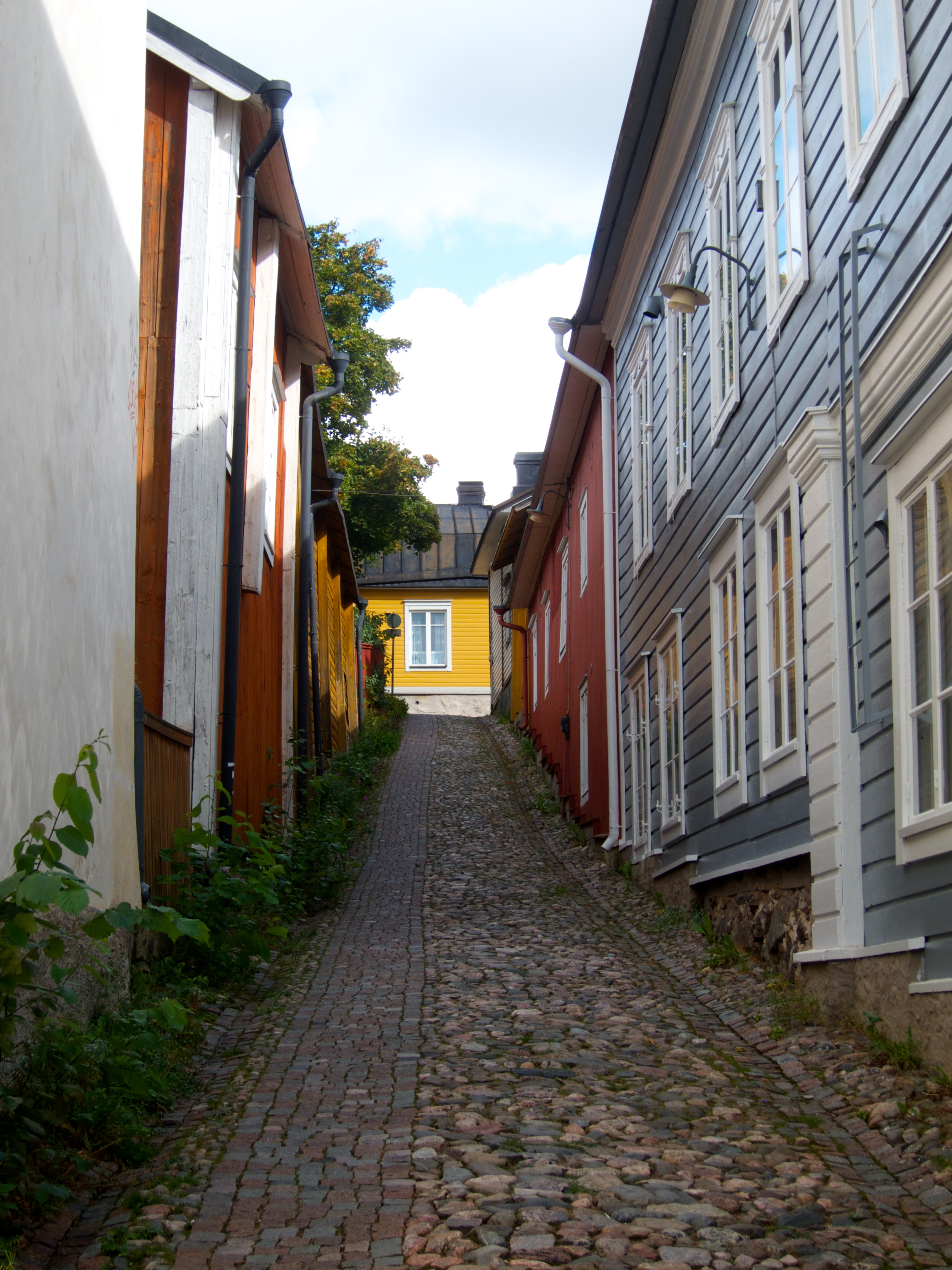 Old Porvoo.